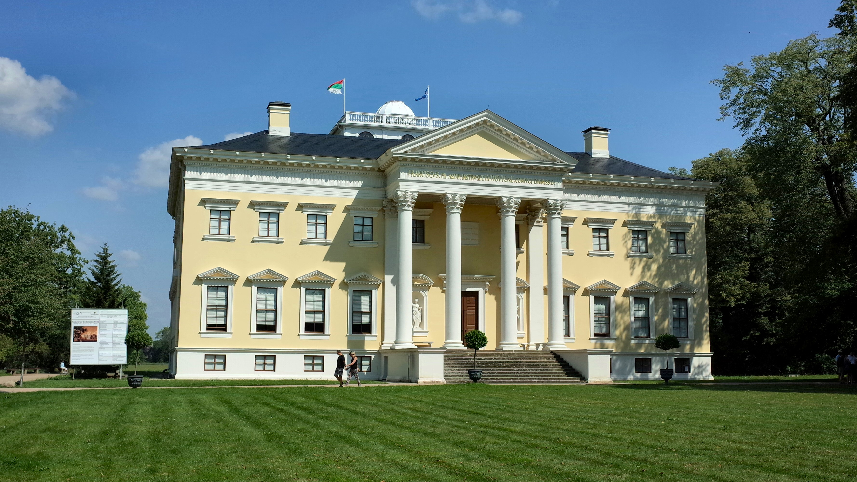 Schloss Wörlitz (Baudenkmal im Denkmalverzeichniss Sachsen-Anhalt, Erfassungsnummer: 094 40059 000 000 000 000 [1])